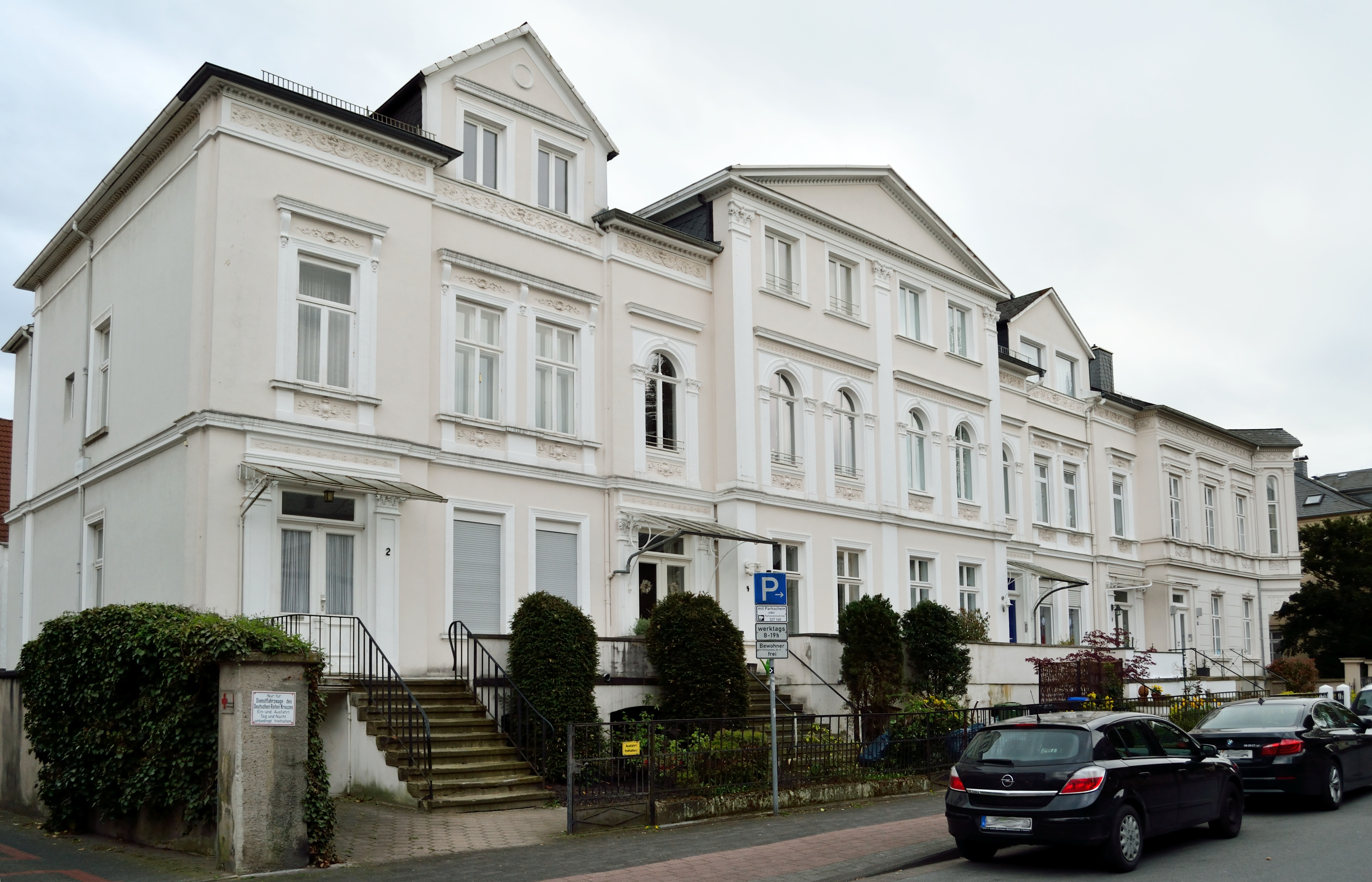 Reihenwohnhaus This is a photograph of an architectural monument.